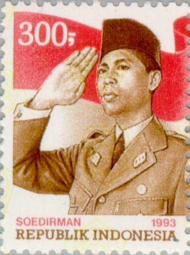 General Sudirman